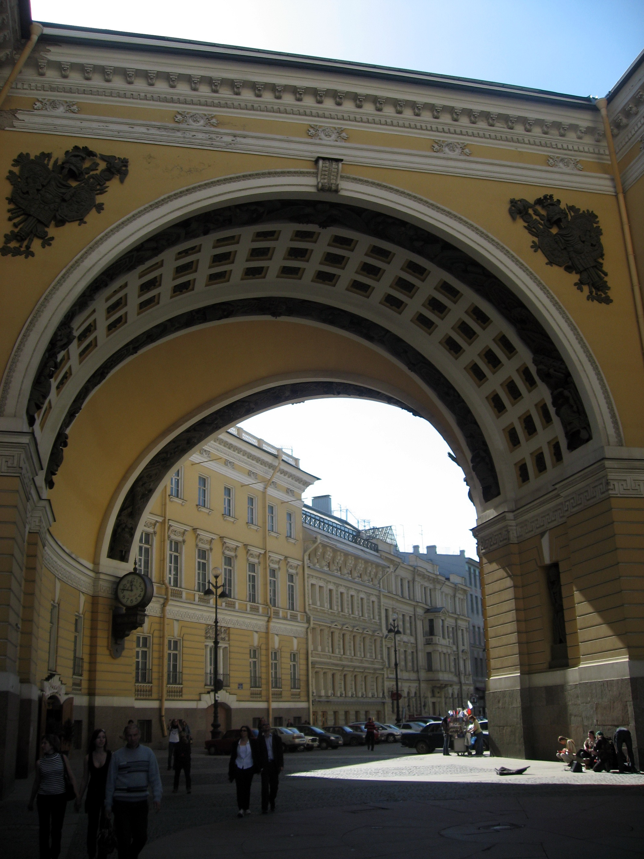 Sankt-Petěrburg (Petrohrad)